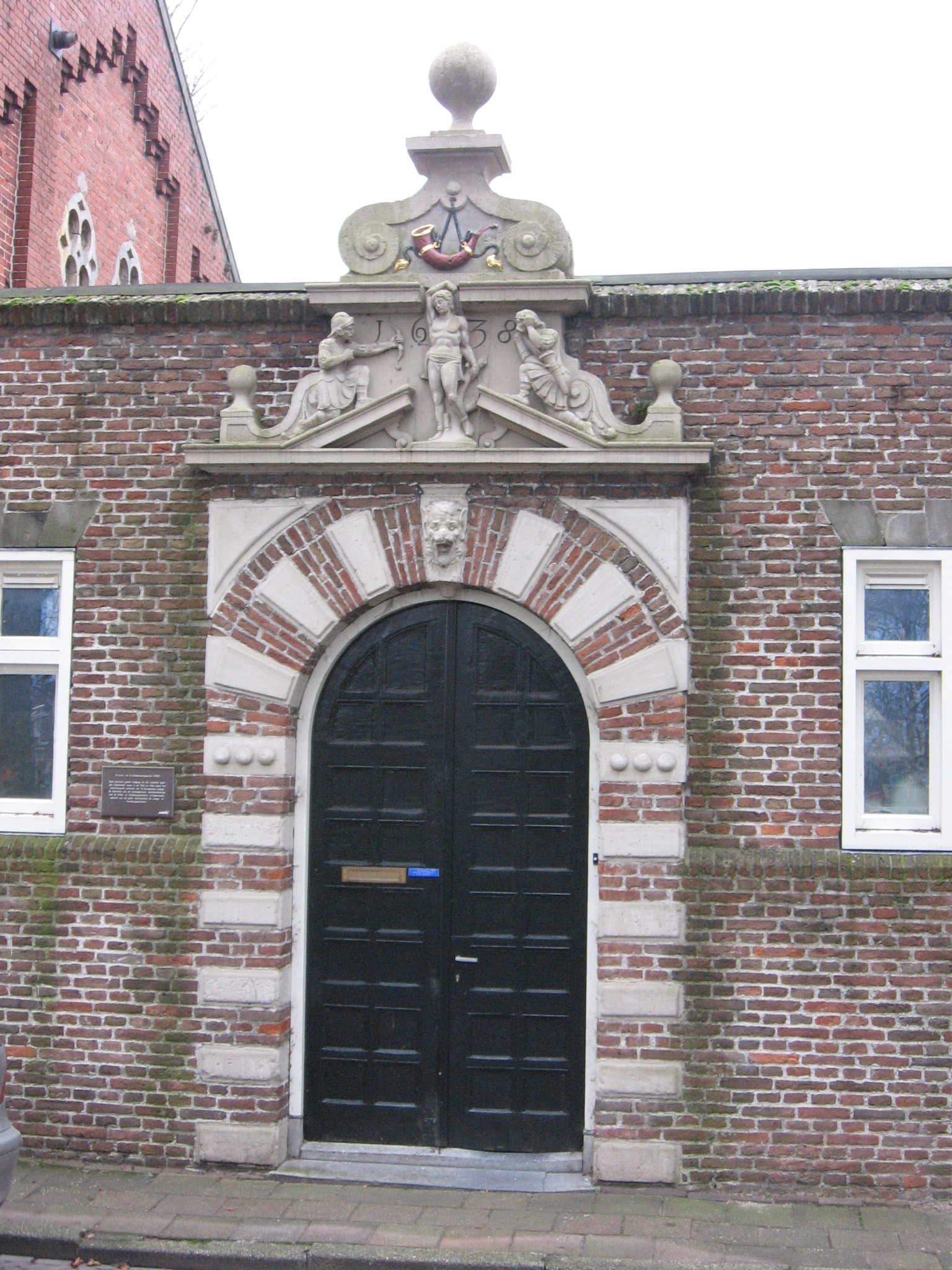 Hoorn, dec 2006